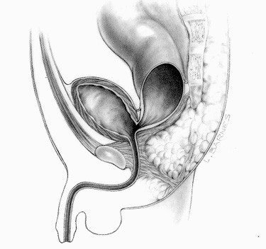 Rectobladder neck fistula